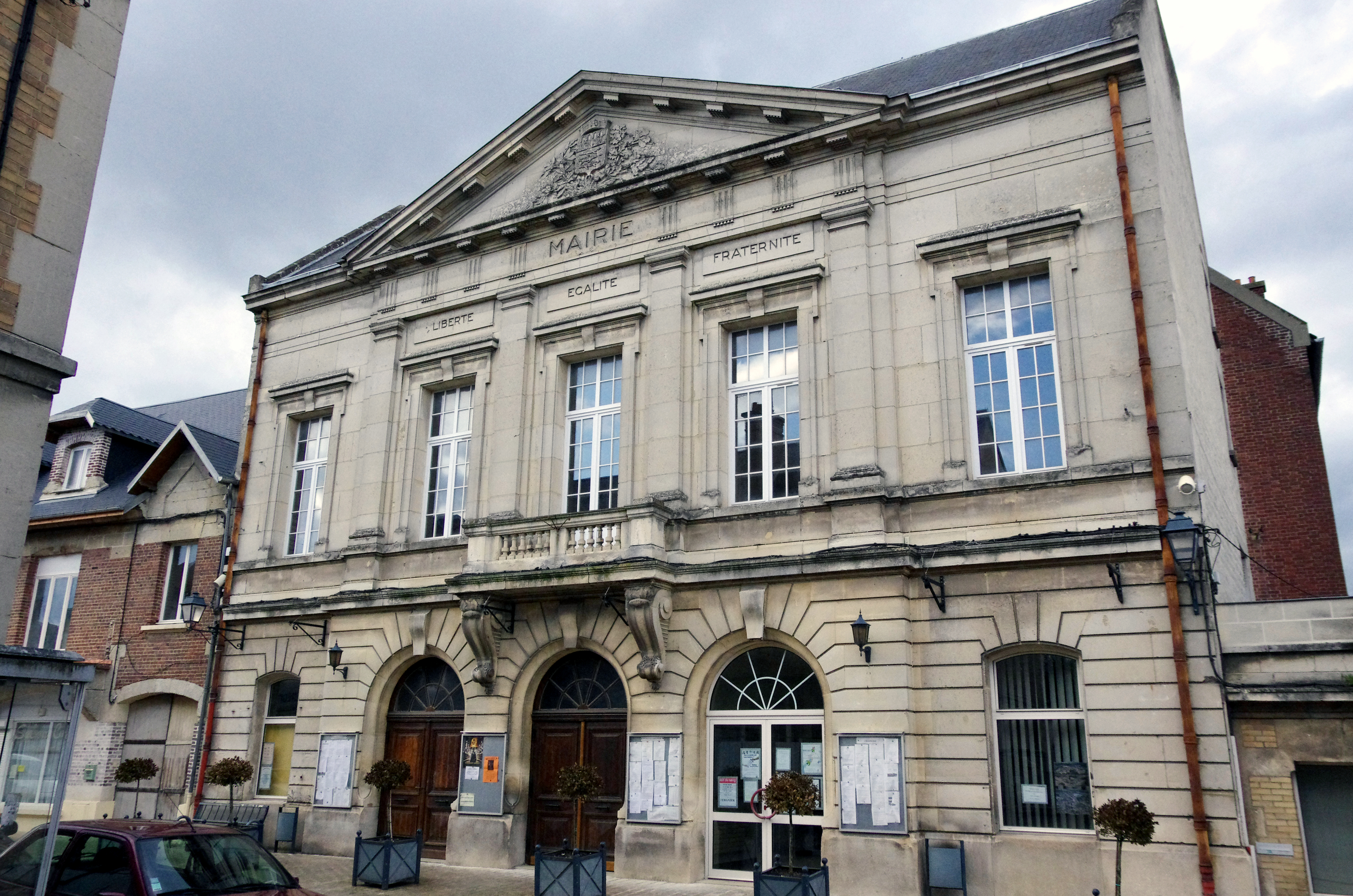 Saint-Gobain (Aisne, France) - La mairie. .